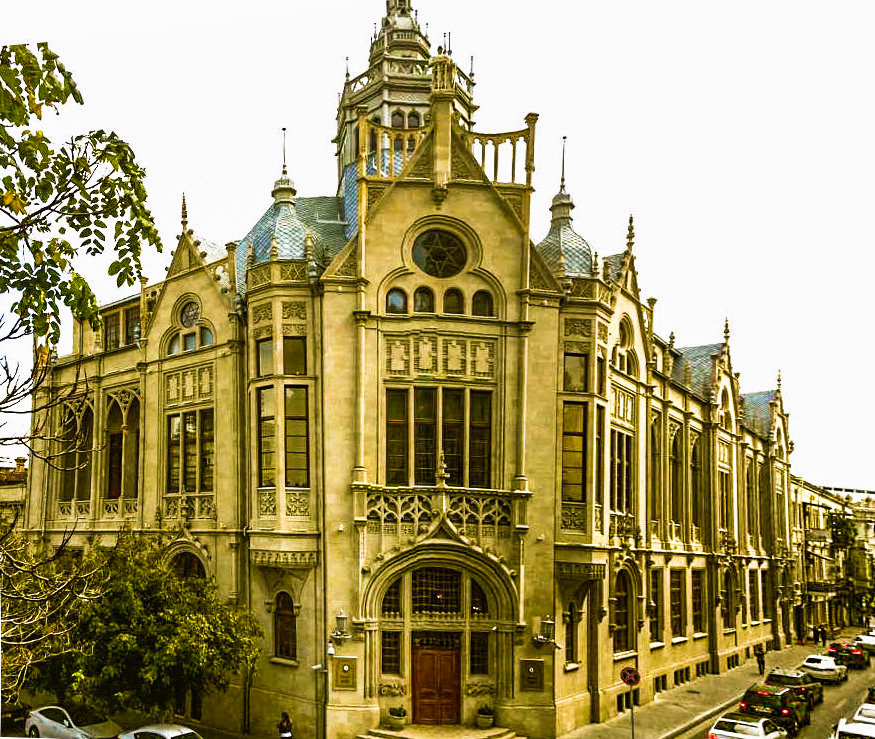 Səadət sarayı əsas fasad